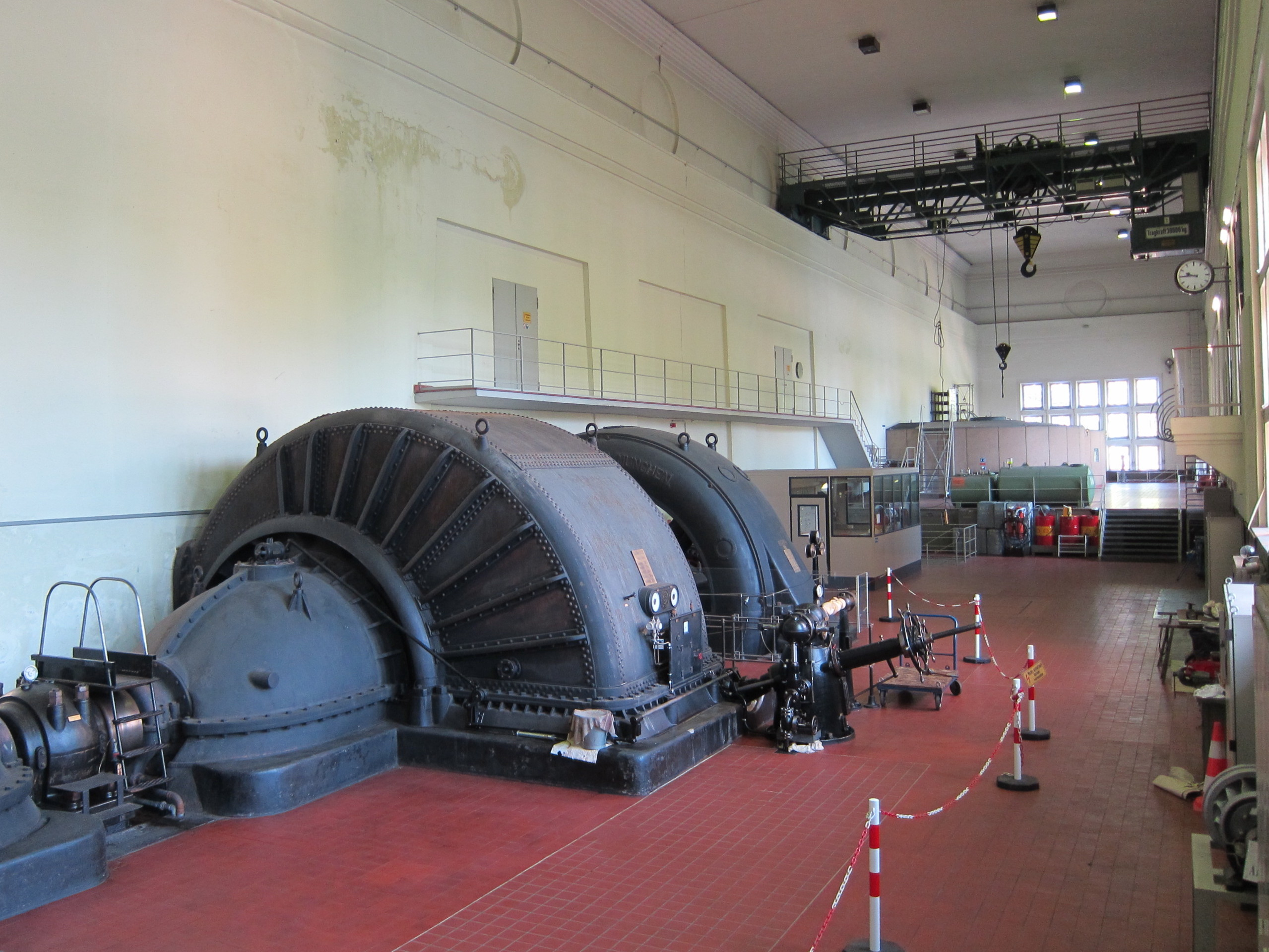 Wasserkraftwerk Neufinsing, die zweite der beiden Francis-Turbinen von Fritz Neumeyer A.G., München, Baujahr 1923